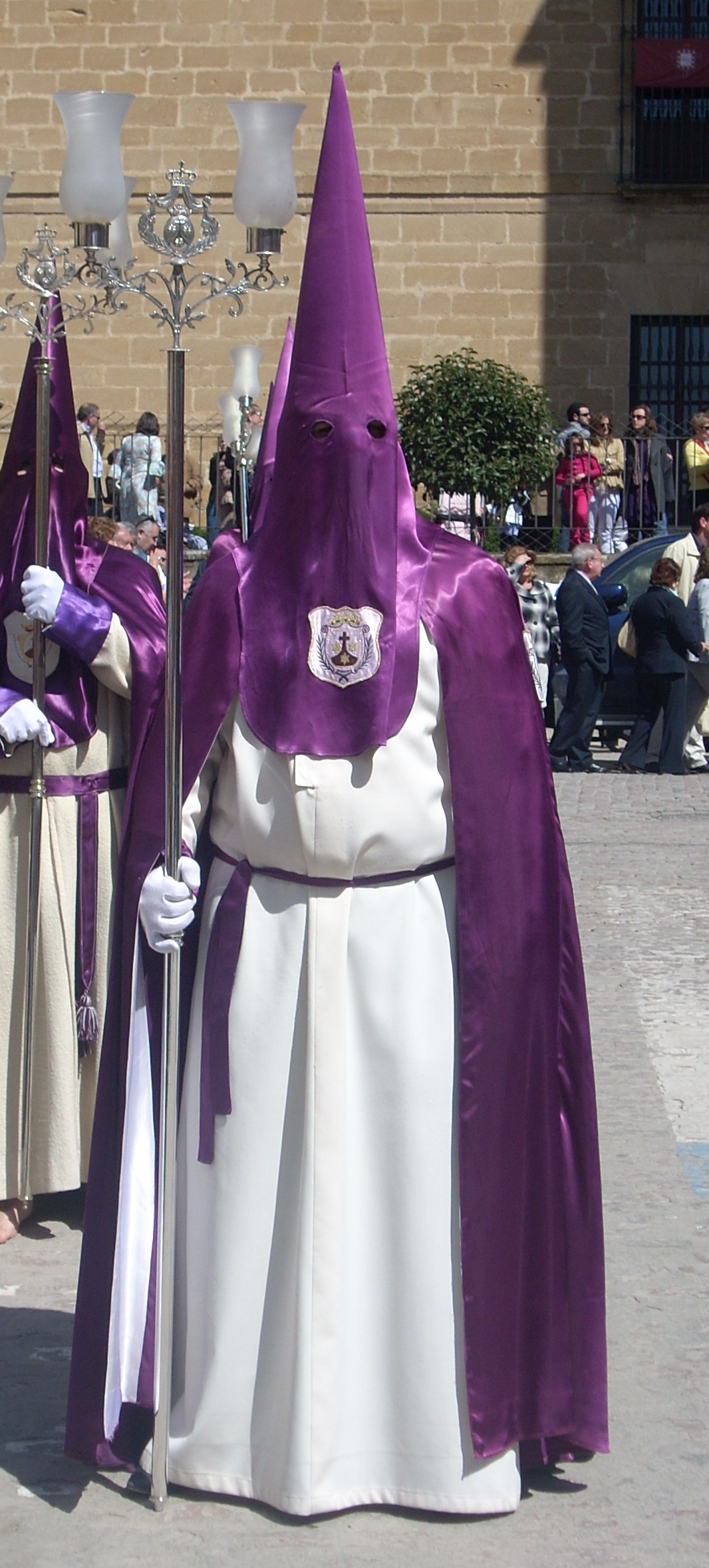 Penitente de Nuestro Padre Jesús de la Caída de Úbeda con su hábito penitencial y varal de Plata Meneses de dos Tulipas